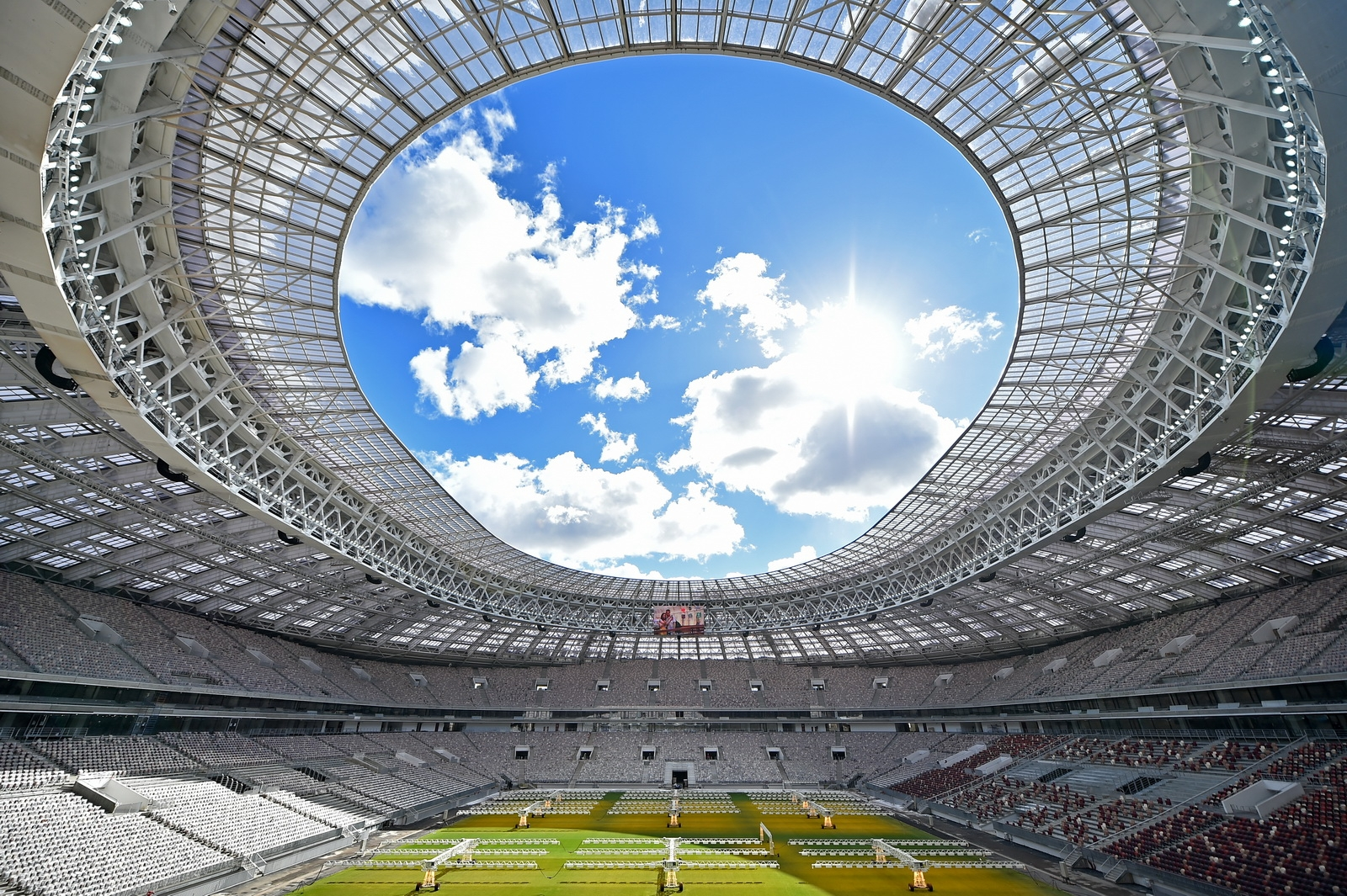 Реконструкция стадиона «Лужники» в Москве.